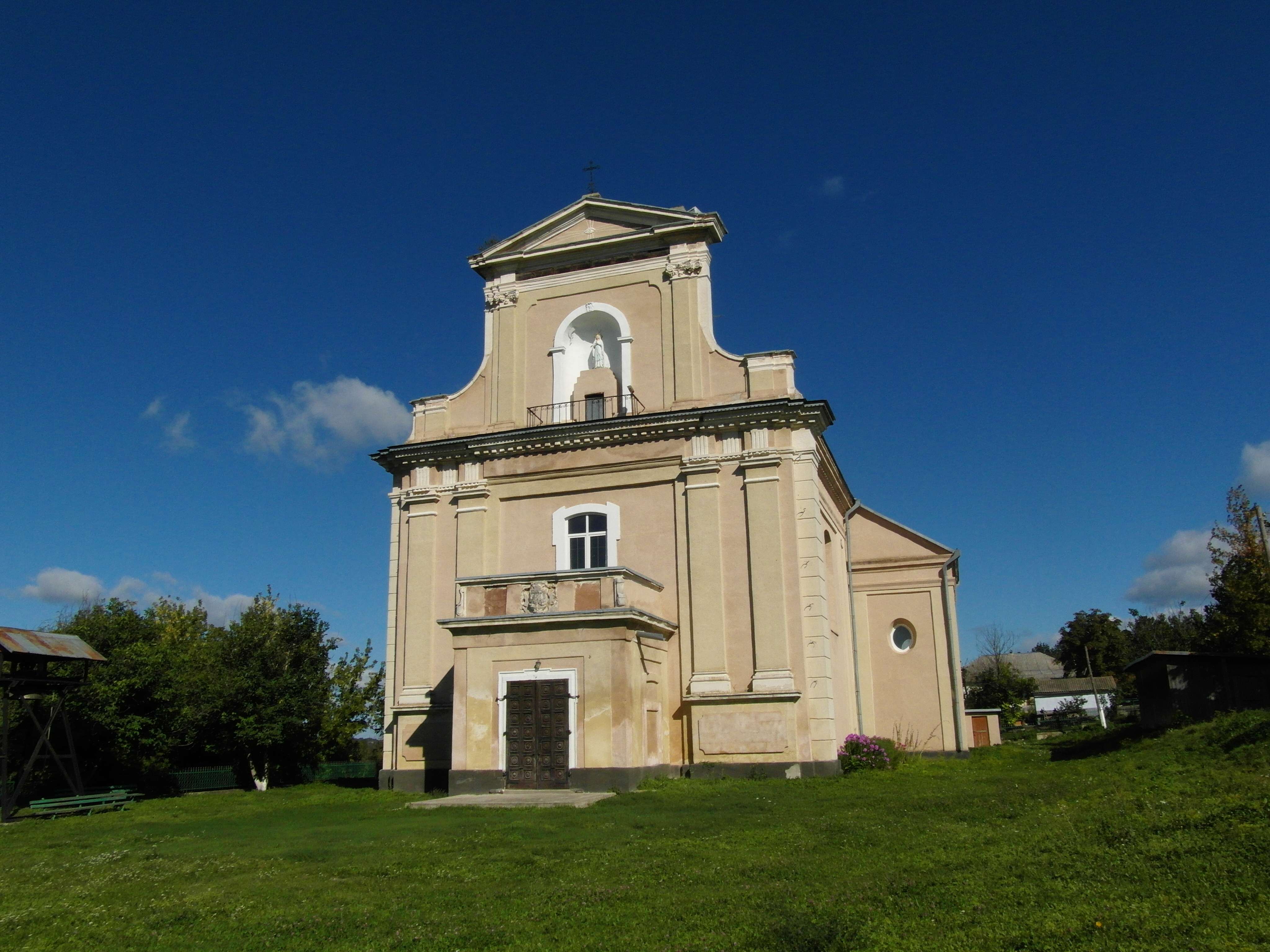 Тарнорудський Костел Божої Матері Святого Скапулярія в 2012 році